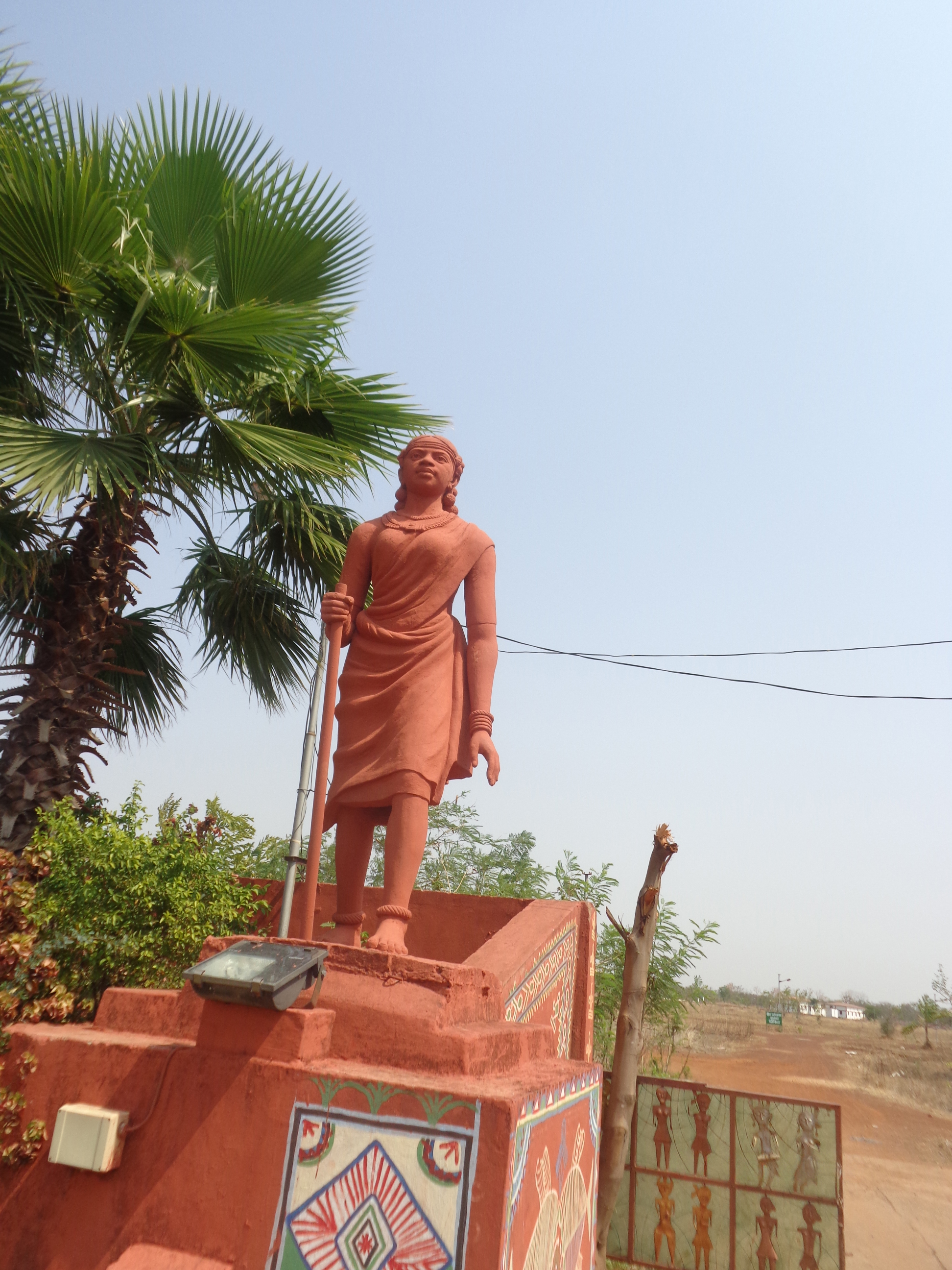 purkhauti muktaangan,uparvara, naya raipur, chattisgarh